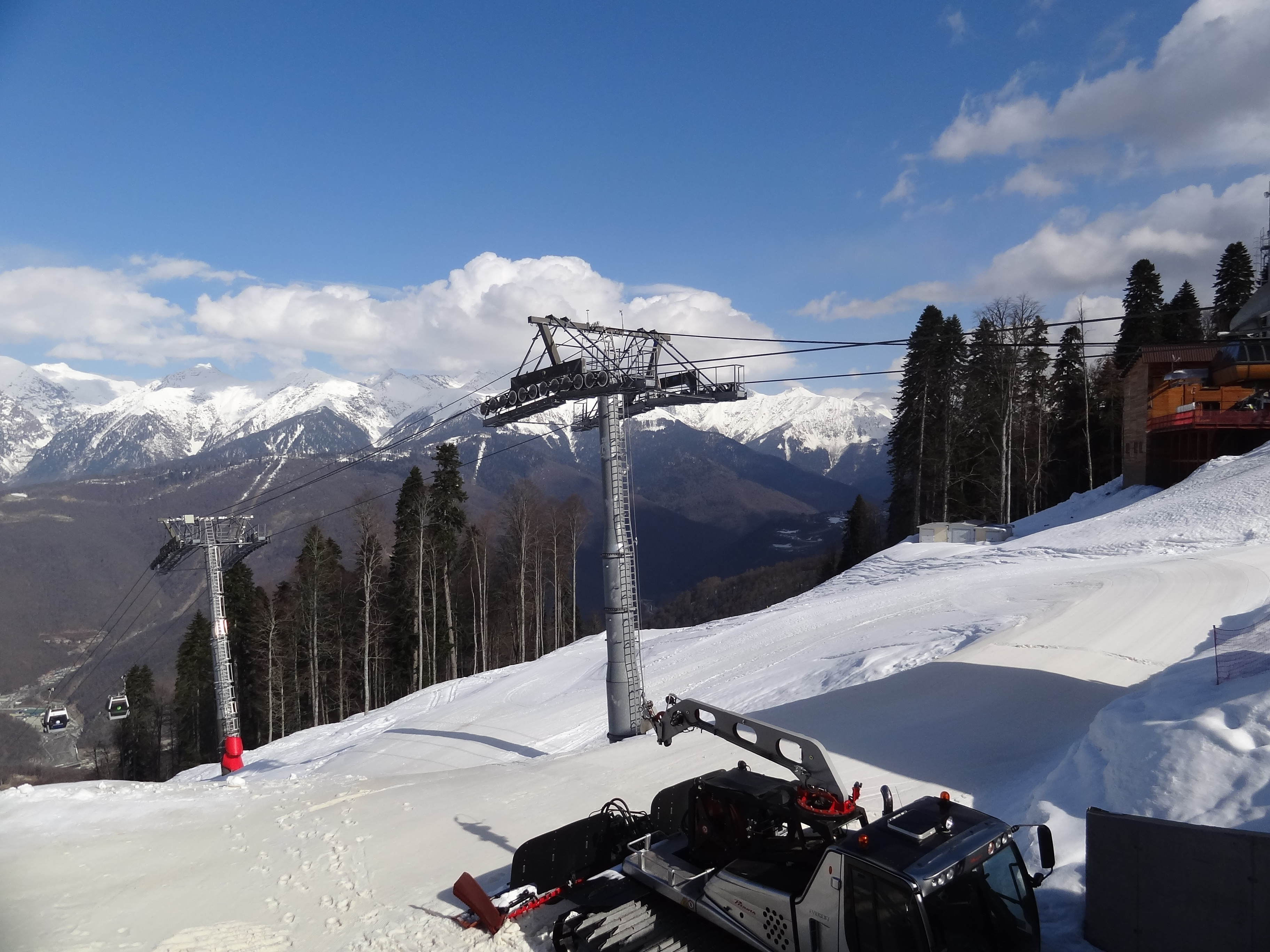 Krasnaya Polyana, 28 февраля 2013 года